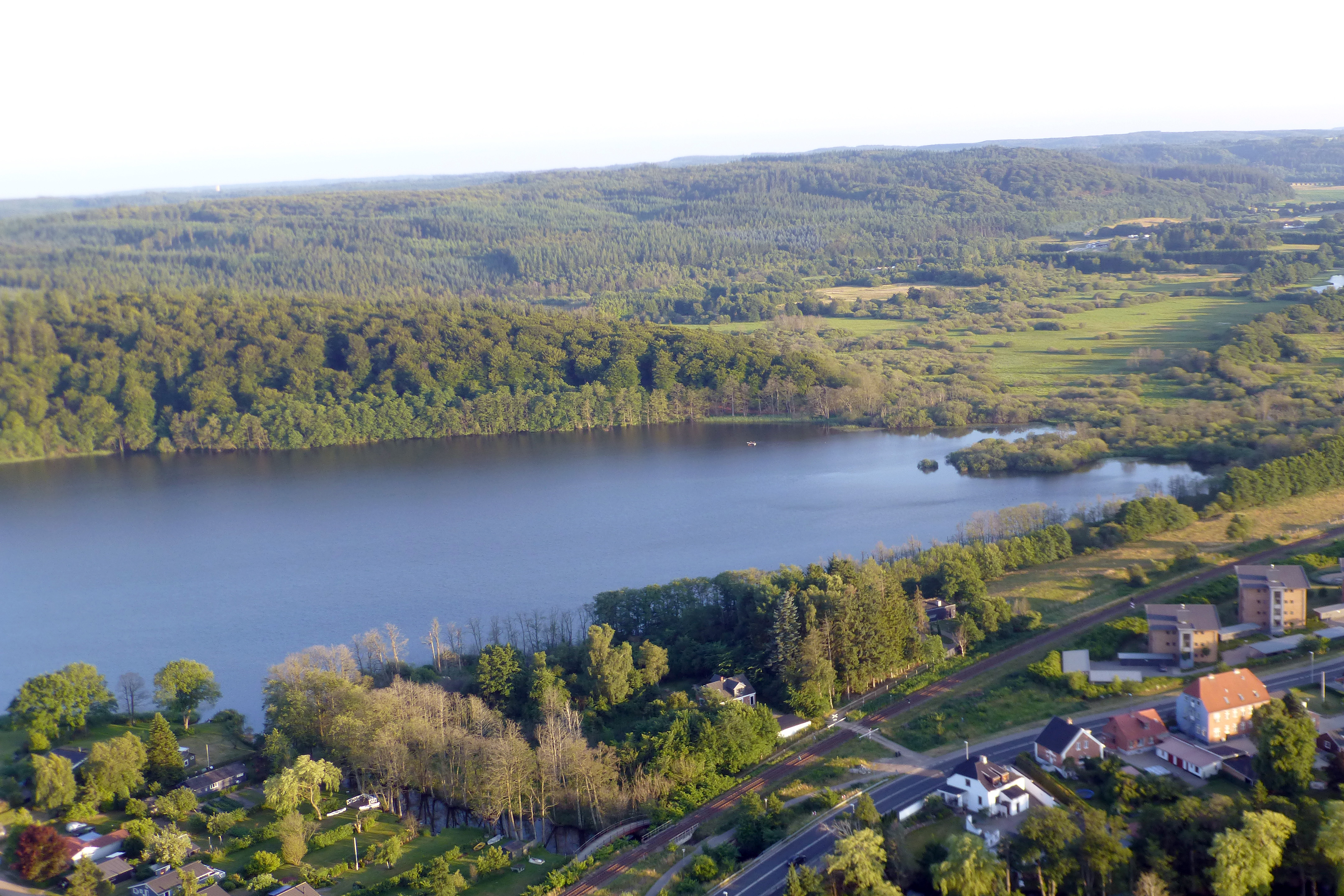 Ørnsø Silkeborg Vesterskov og Funderholme set mod sydvest